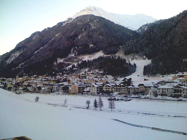 Ischgl